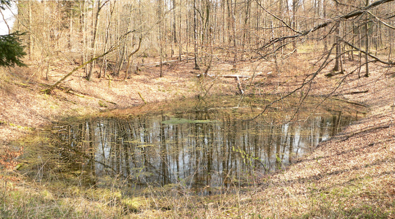 Erdfall im Elm, mit Wasser vollgelaufen